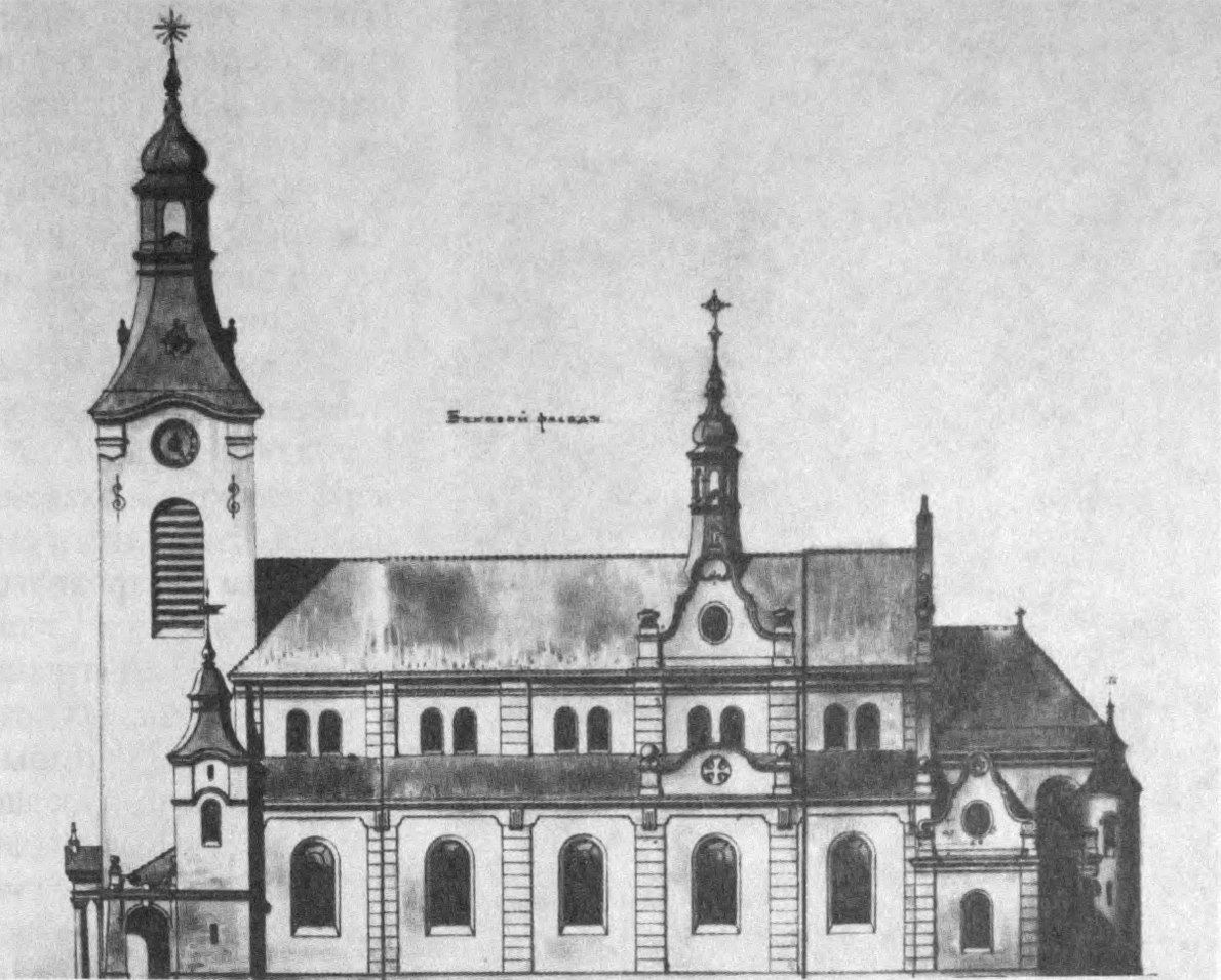 Беларуская (тарашкевіца): Вялікія Эйсманты (Vialikija Ejsmanty). Касьцёл, нерэалізаваны праект